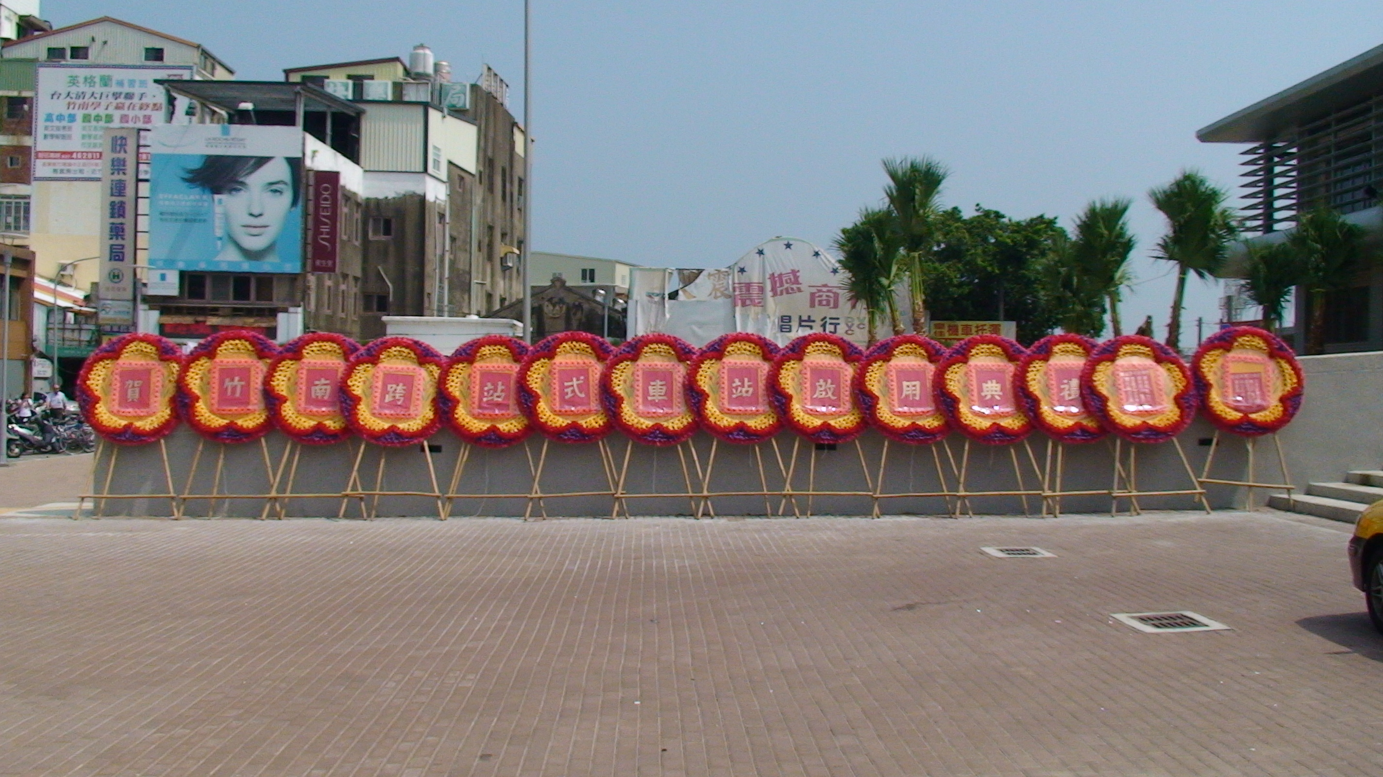 賀竹南跨站式車站啟用典禮，攝於竹南車站外。